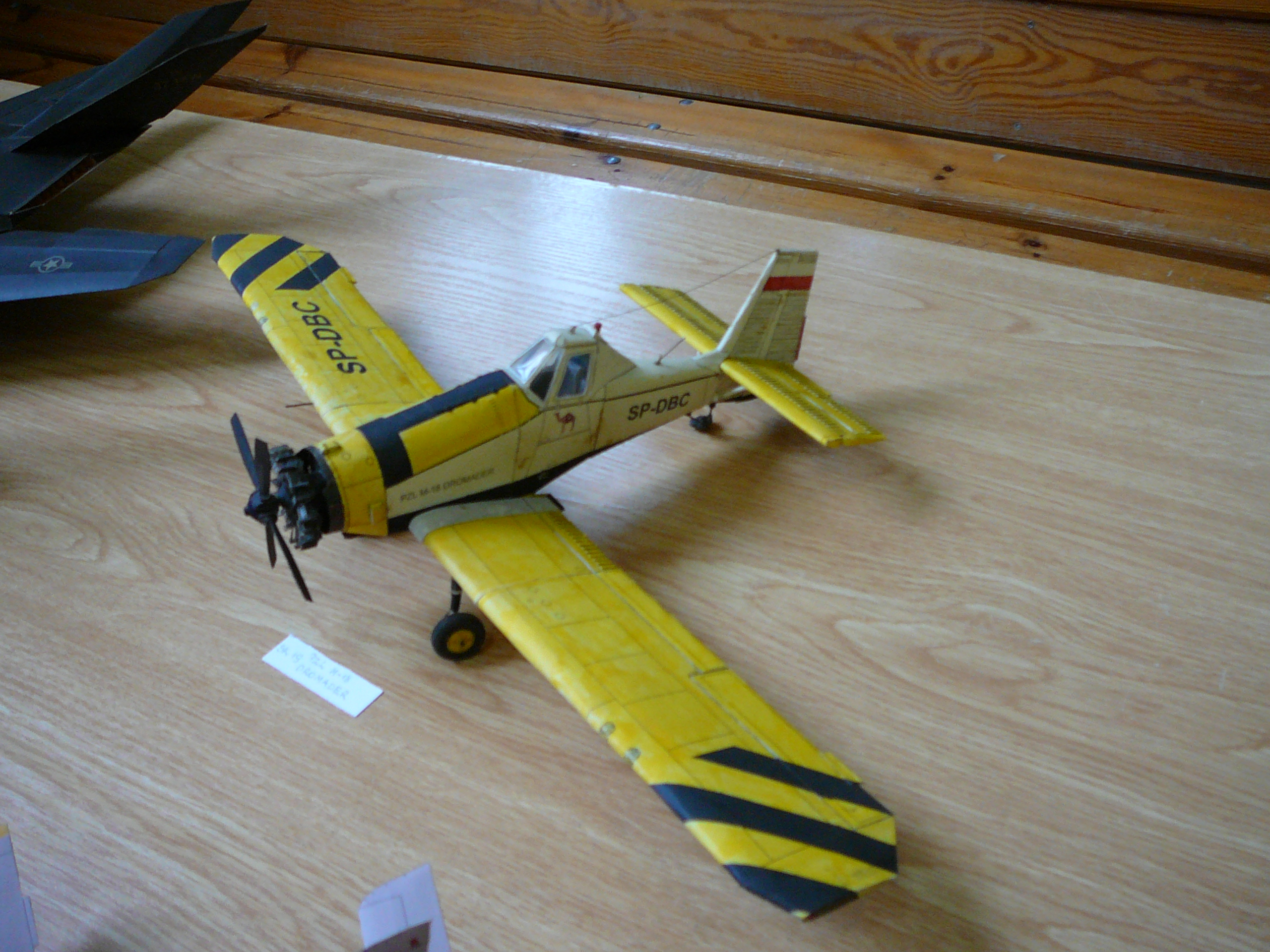 Kartonowy model redukcyjny samolotu PZL M-18 Dromader podczas „Wystawy-konkursu kartonowych i plastikowych redukcyjnych modeli samolotów, szybowców, rakiet, śmigłowców i dioram lotniczych” w Mielcu w 2014 roku.